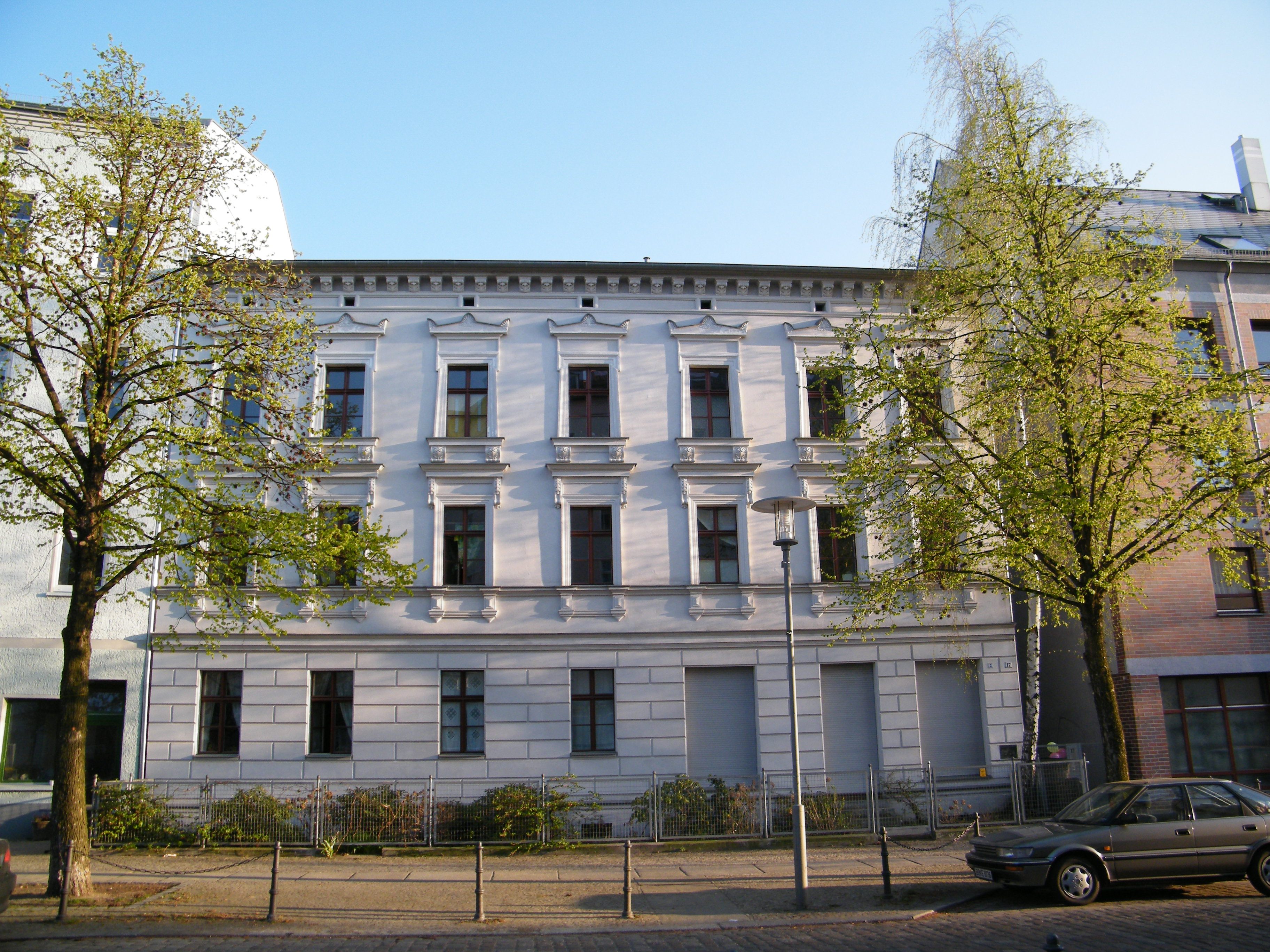 Betonhaus in der Berliner Türrschmidtstraße, Kulturdenkmal.